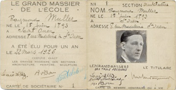 GMBA carte adhérent Raymond Muller 1926